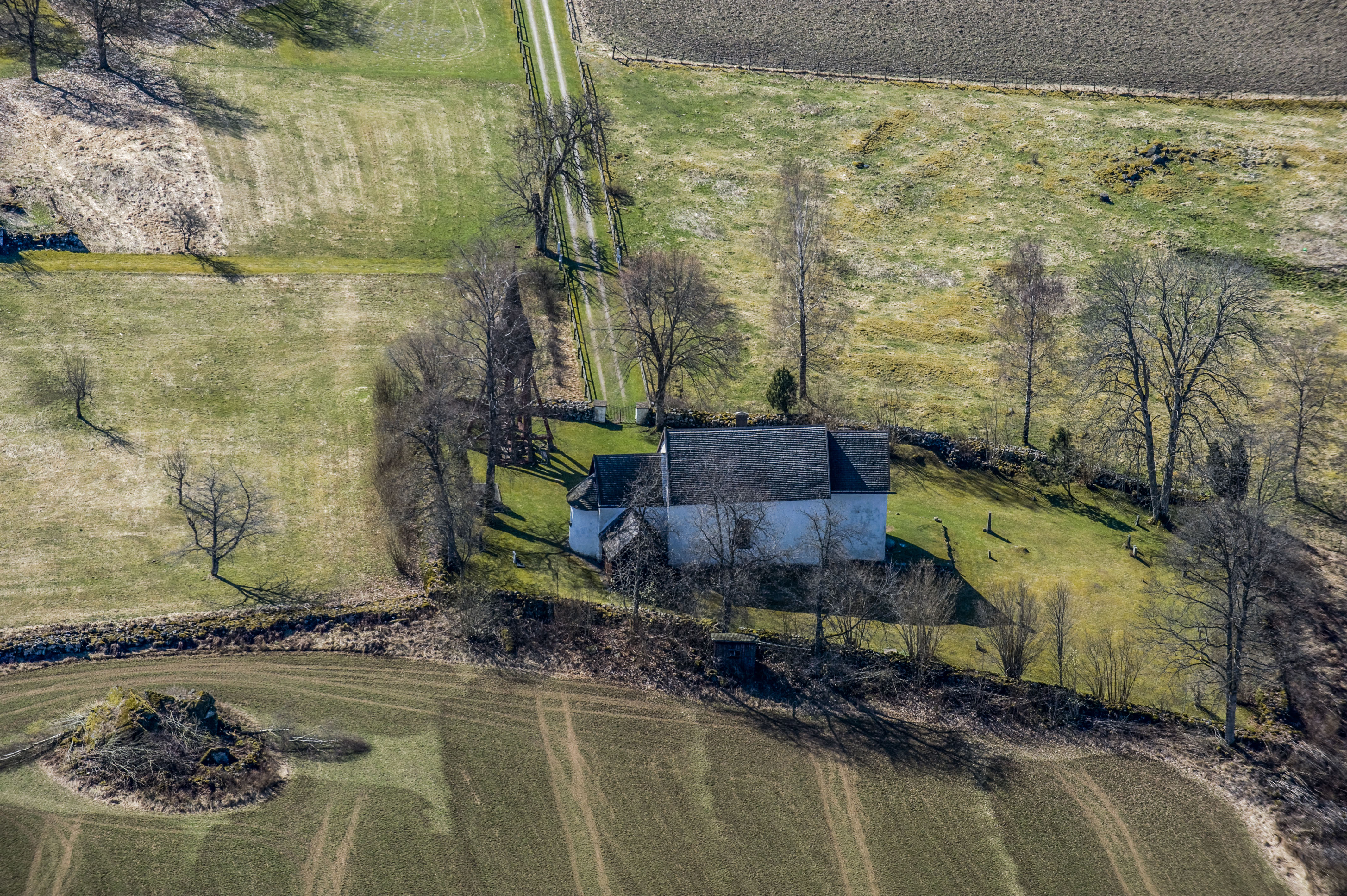 Gamla Vallsjö ka